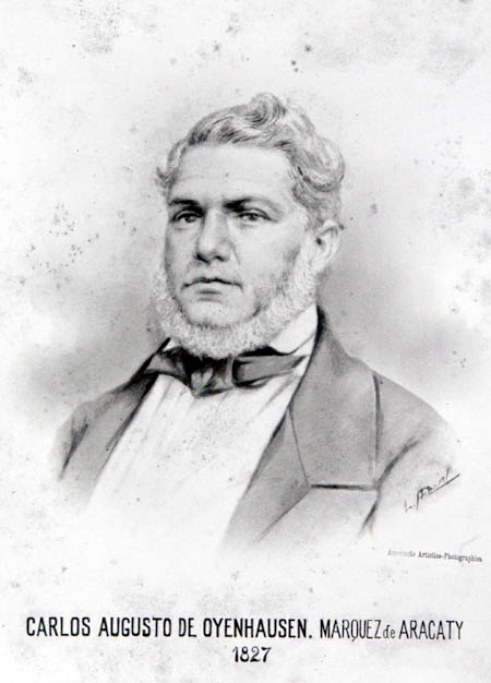 João Carlos Augusto de Oyenhausen-Gravenburg, o Marquês de Aracati.